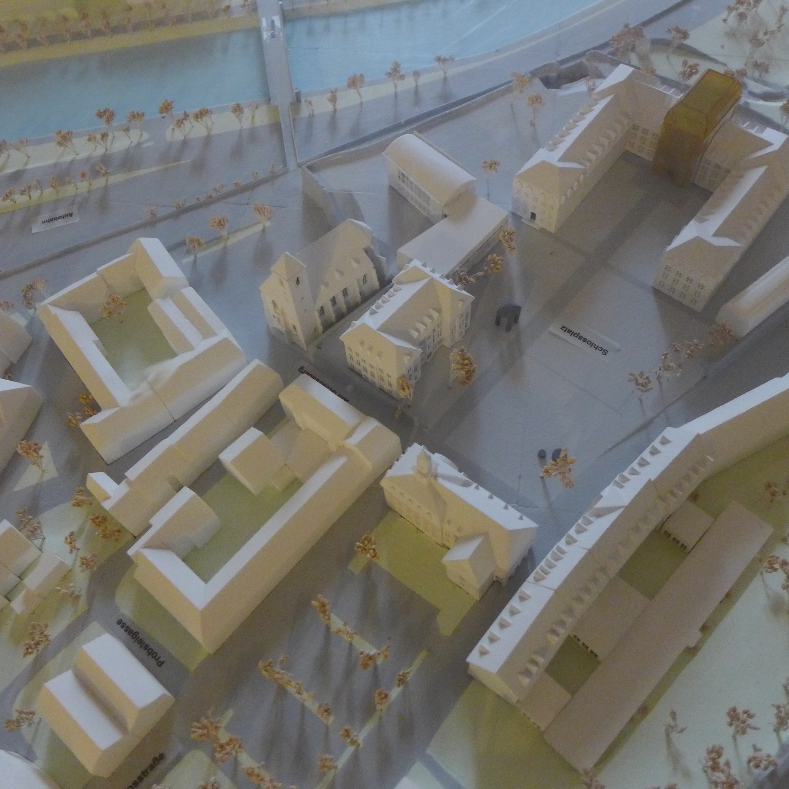 Schlosskirche Saarbrücken, Stadtmodell Saarbrücken (Rathaus St. Johann)